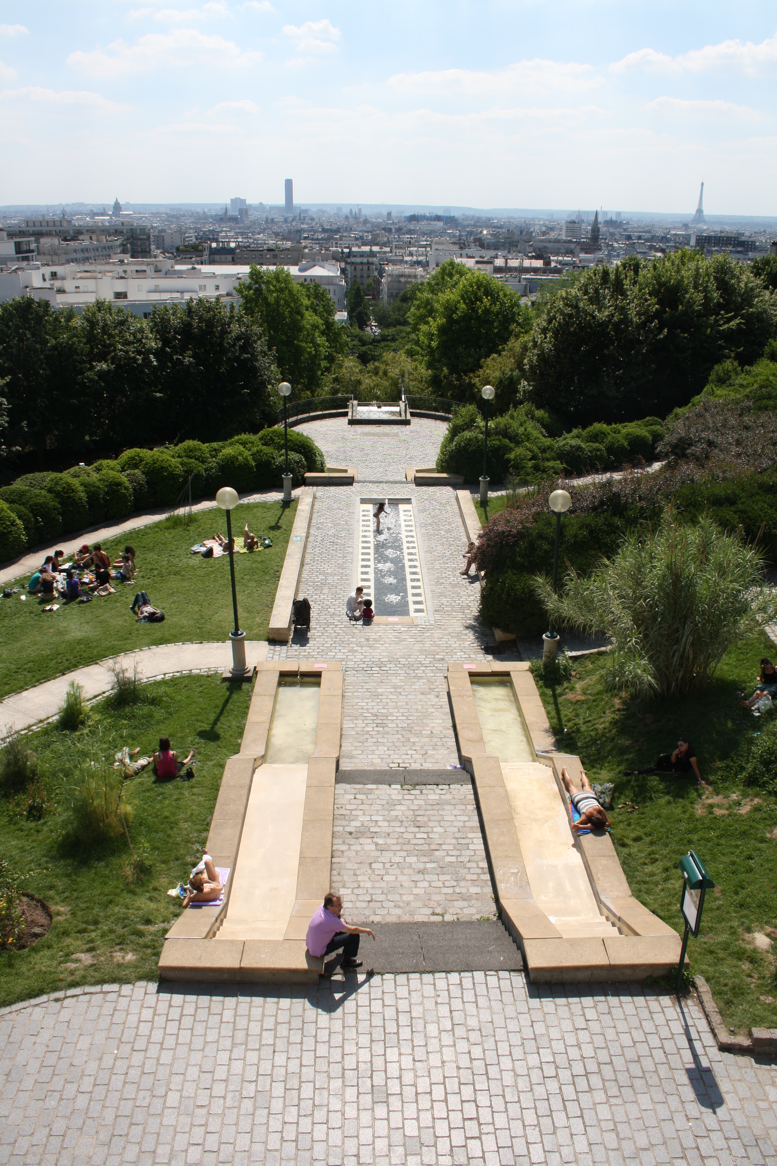 Parc de Belleville